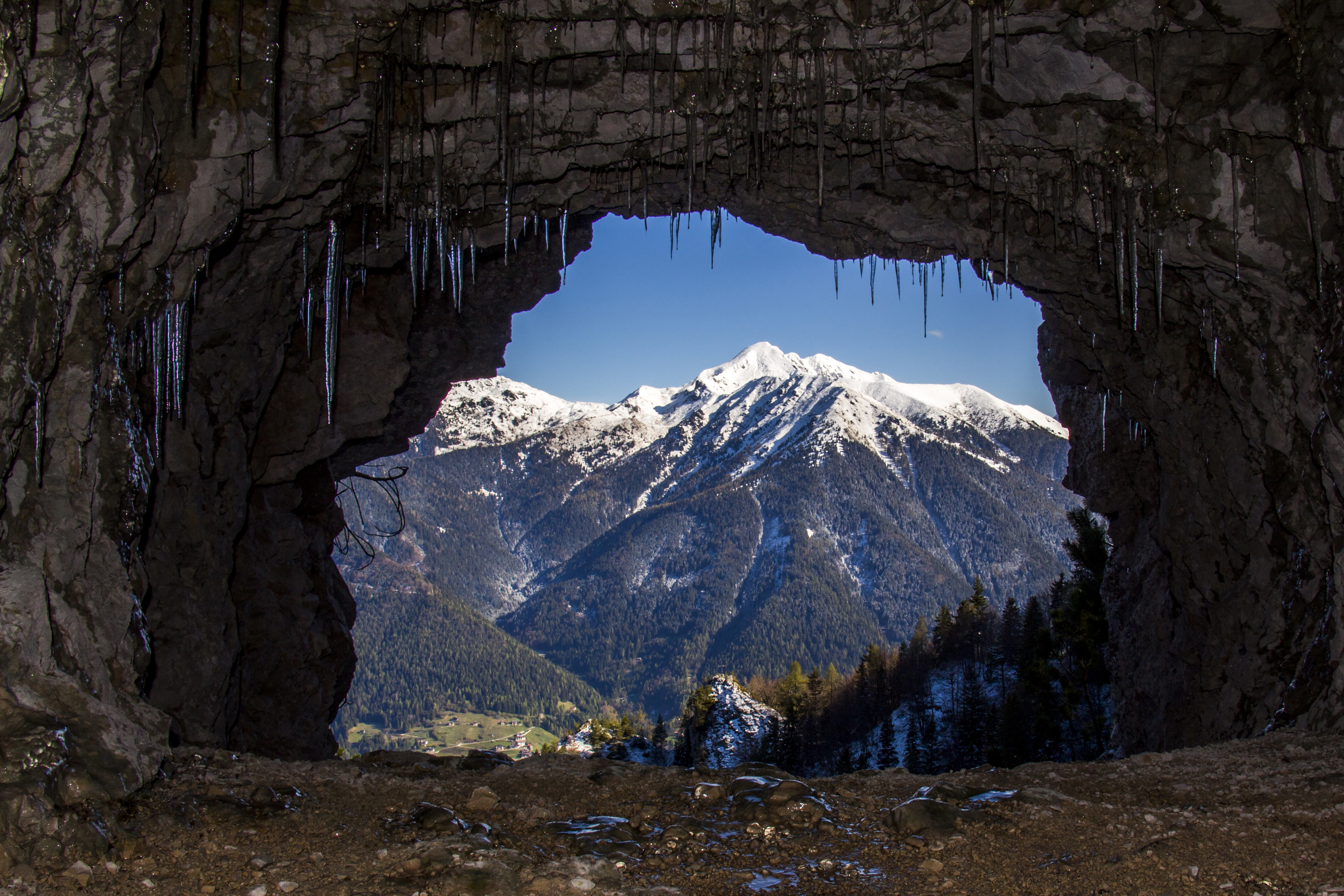 Lagorai (Q47493713)